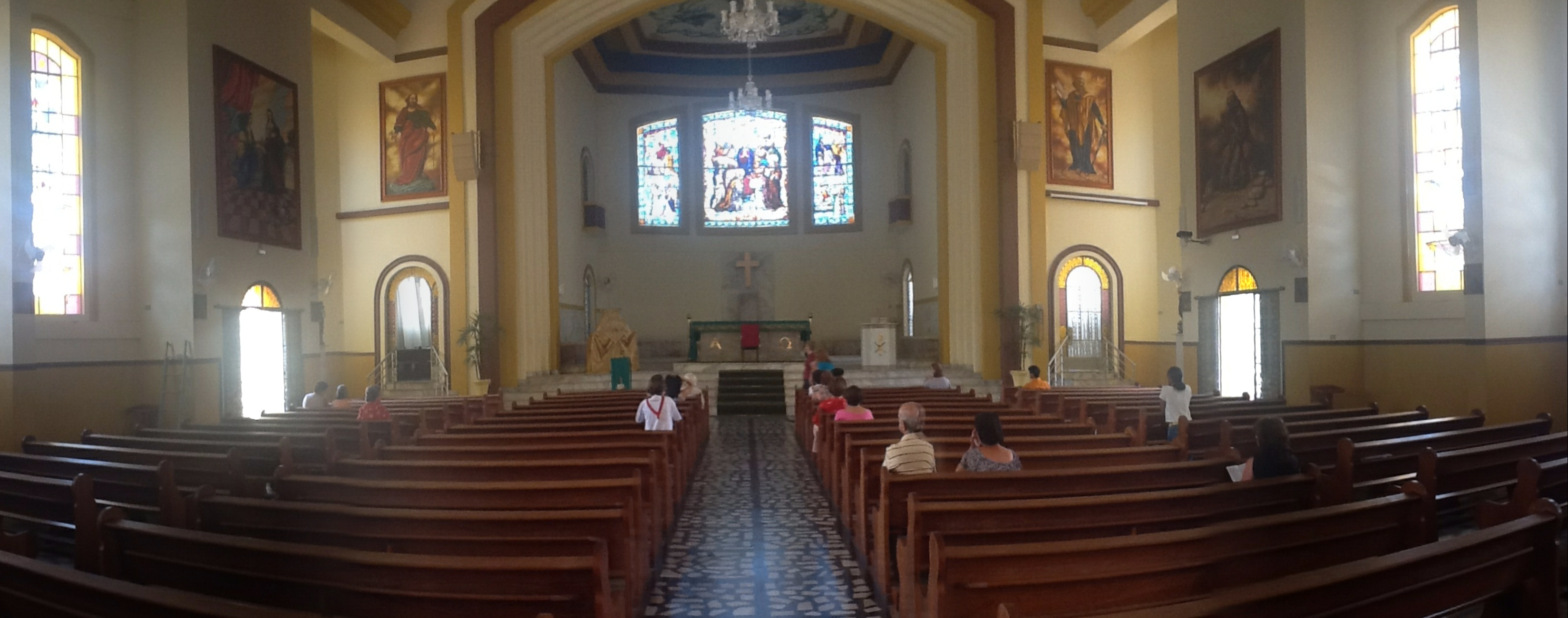 Catedral de Divinópolis - MG